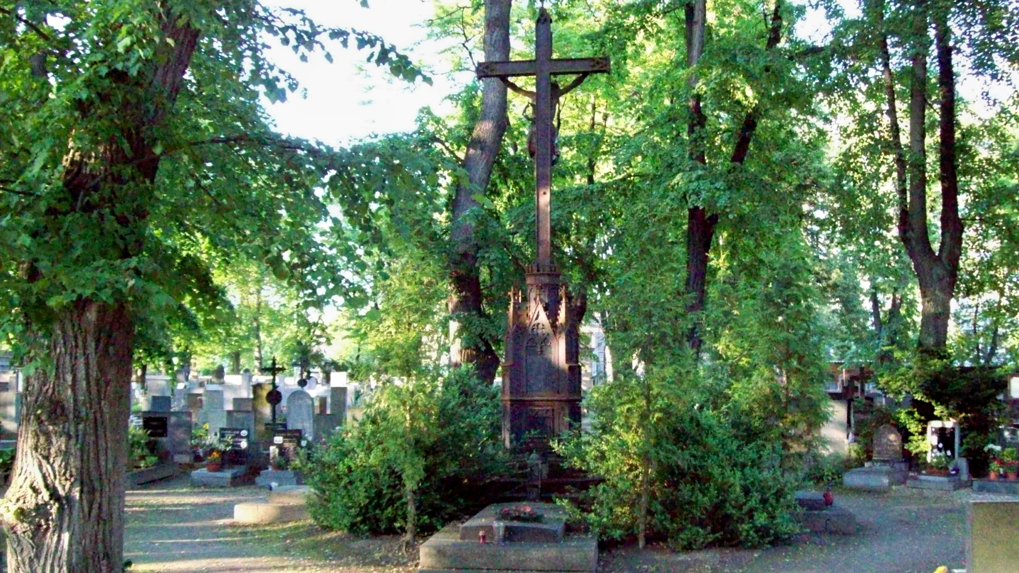 Centrální hrob na hřbitově sv. Václava v Mělníku, kde jsou pohřbeni faráři.